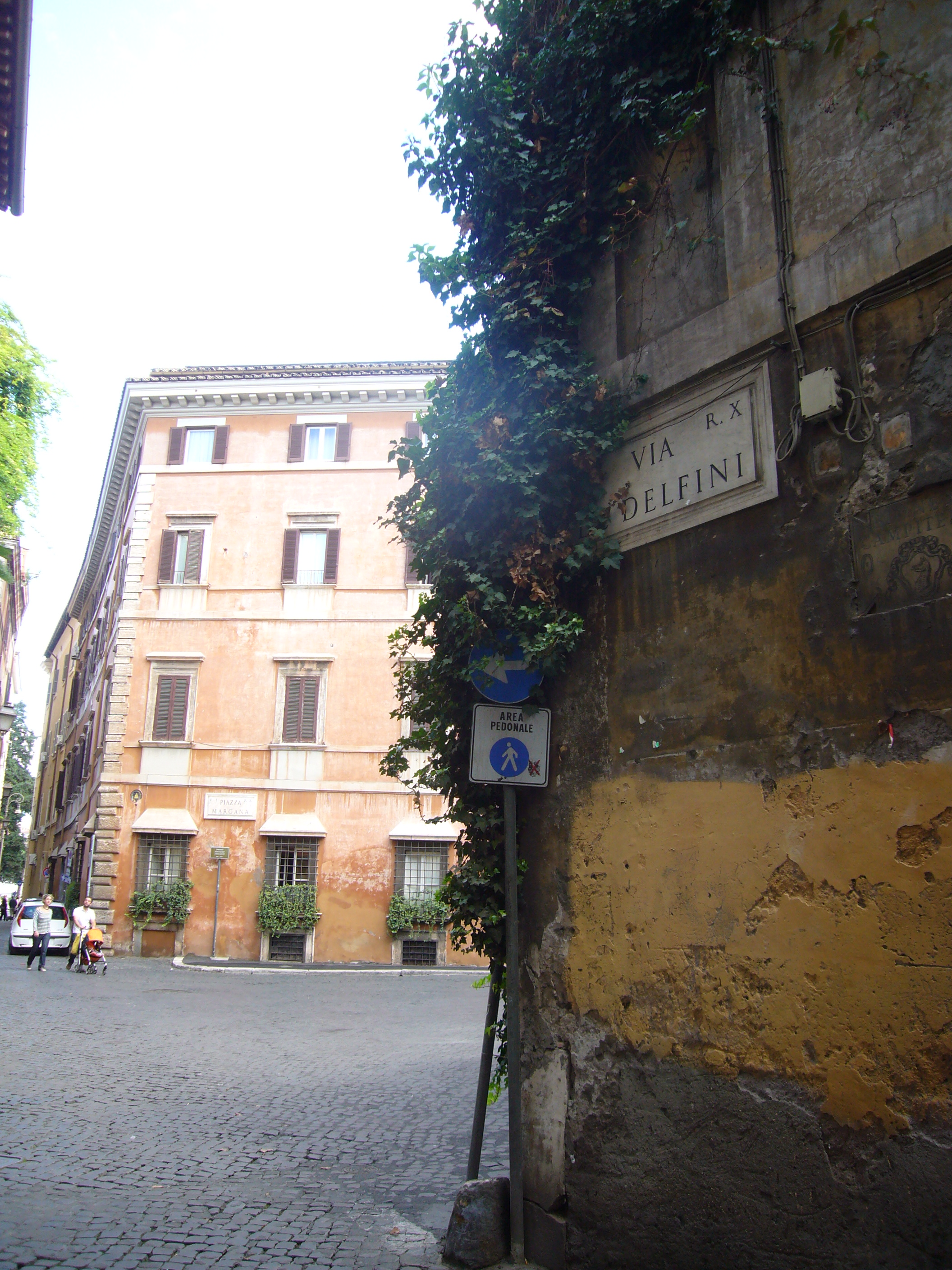 Roma, via dei Delfini lato Campitelli e piazza Margana, in fondo.